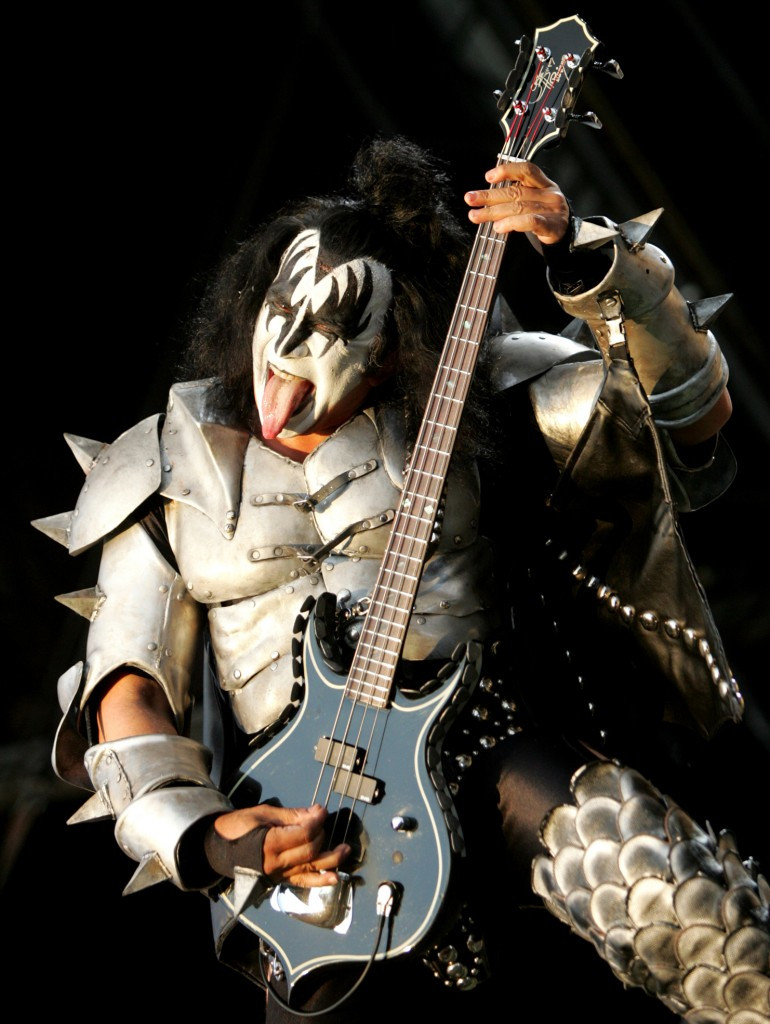 Gene Simmons tocando el bajo